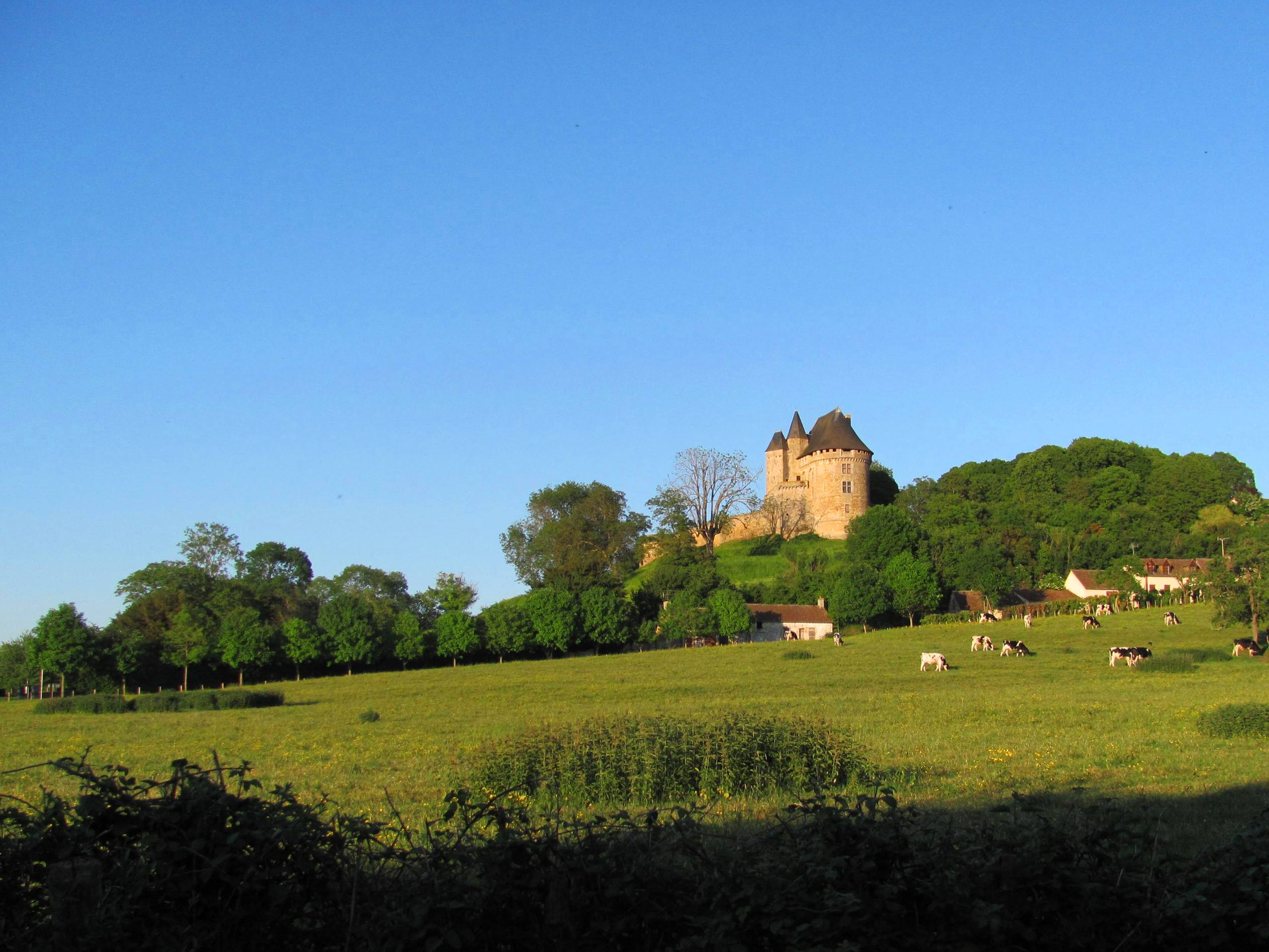 château de Ballon (72)